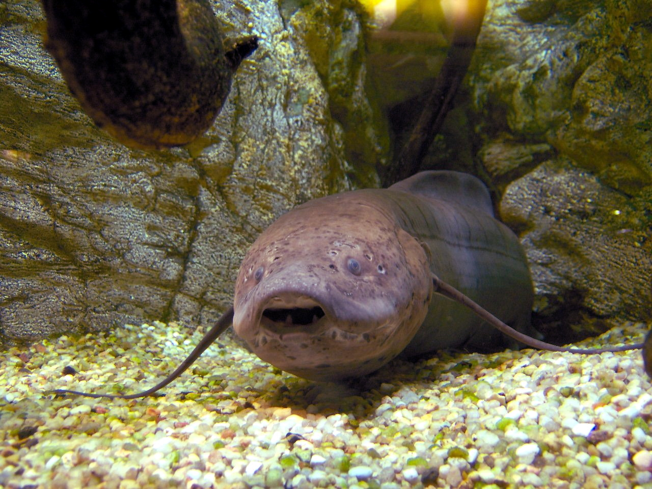 Protopterus annectens at Paris Aquarium